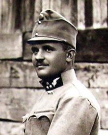 Leopold Lojka (1886 - 1926), Čech, řidič vozu převážející rakouského následníka trůnu Františka Ferdinanda d'Este během atentátu v Sarajevu.